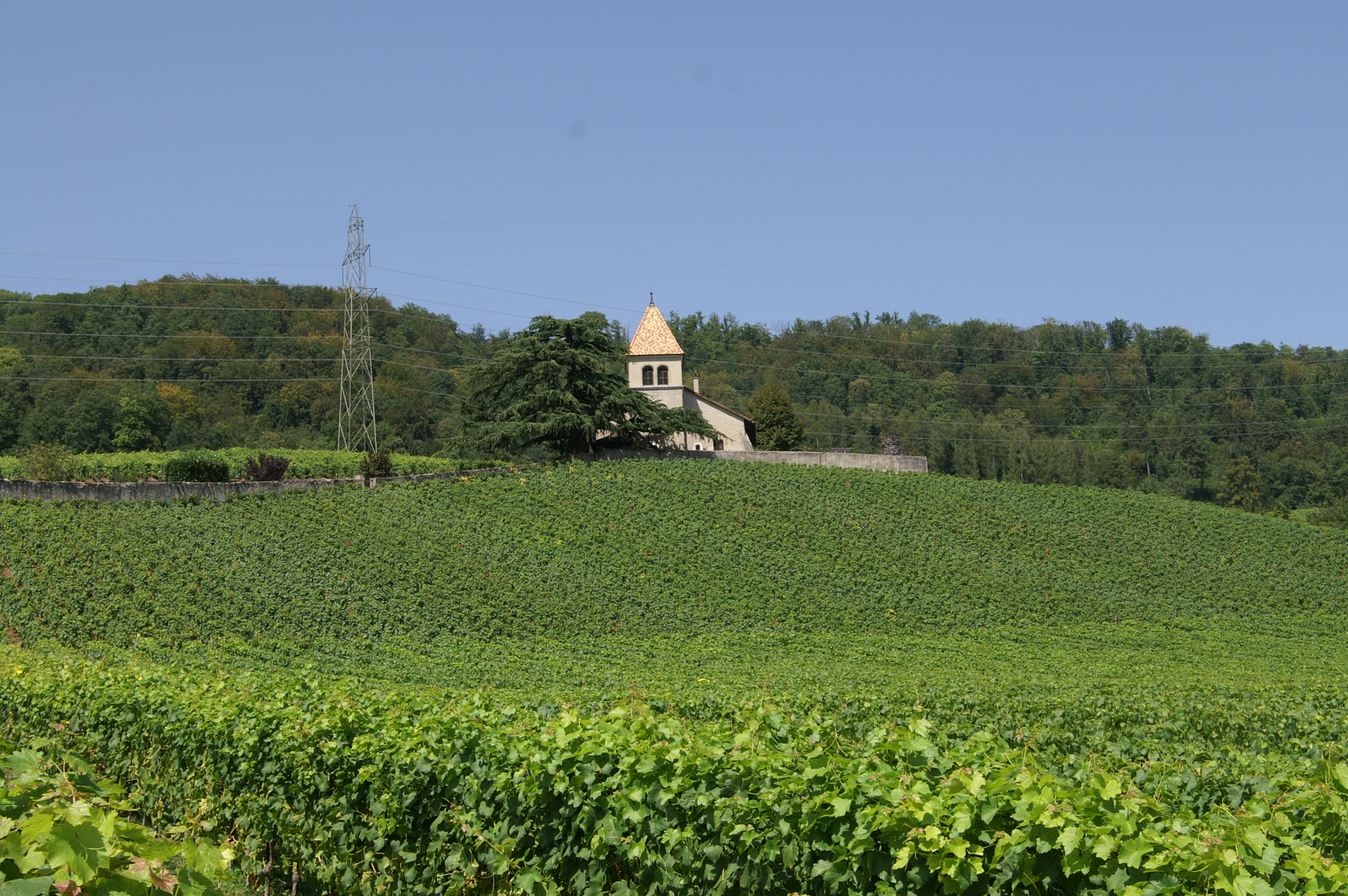 L'église de Luins au milieu des vignobles.